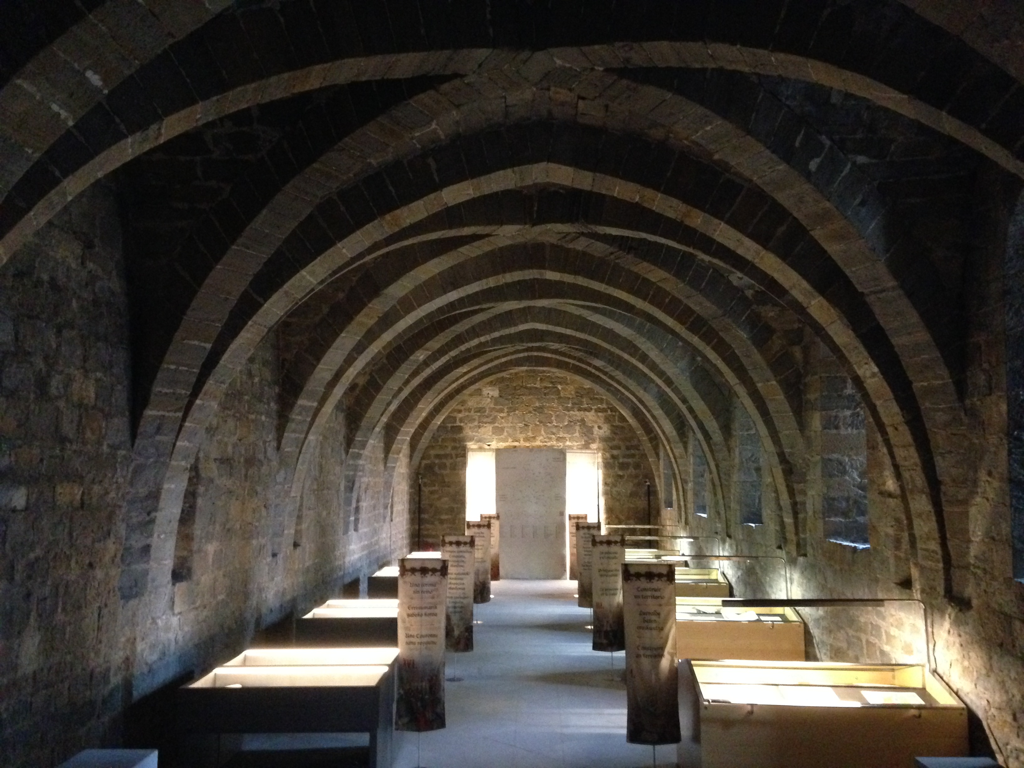 Nafarroako Errege jauregiko areto gotiko gangaduna